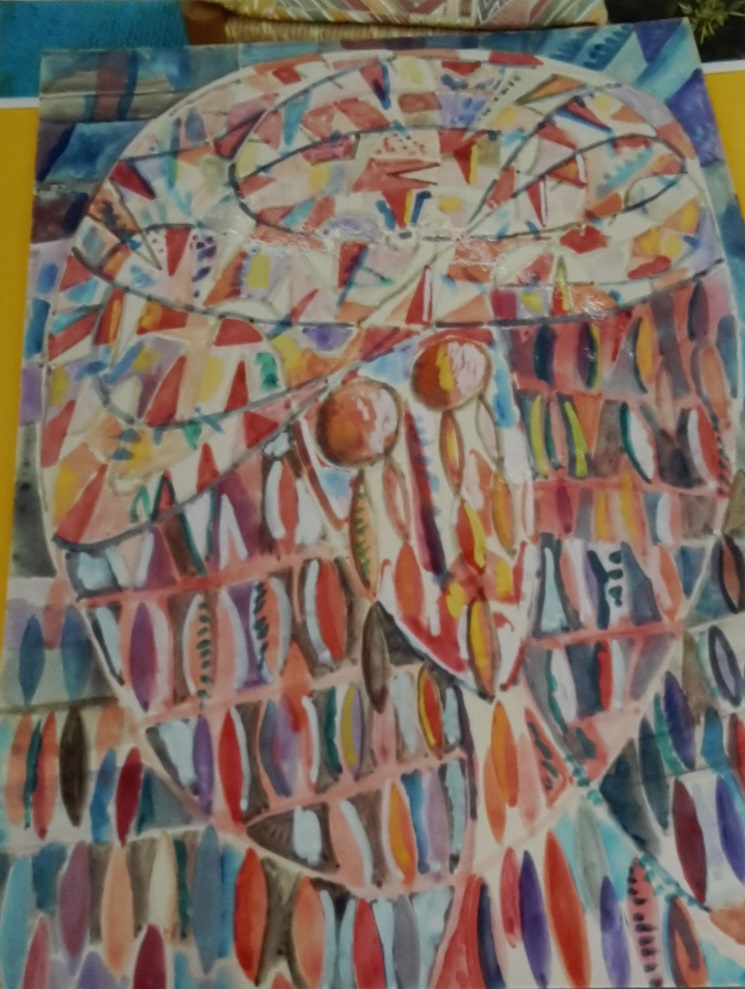 acquarello